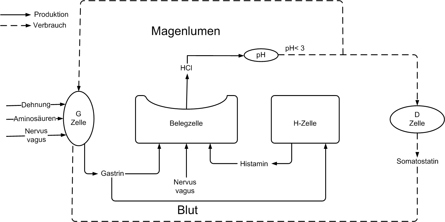 Magensäureregulation